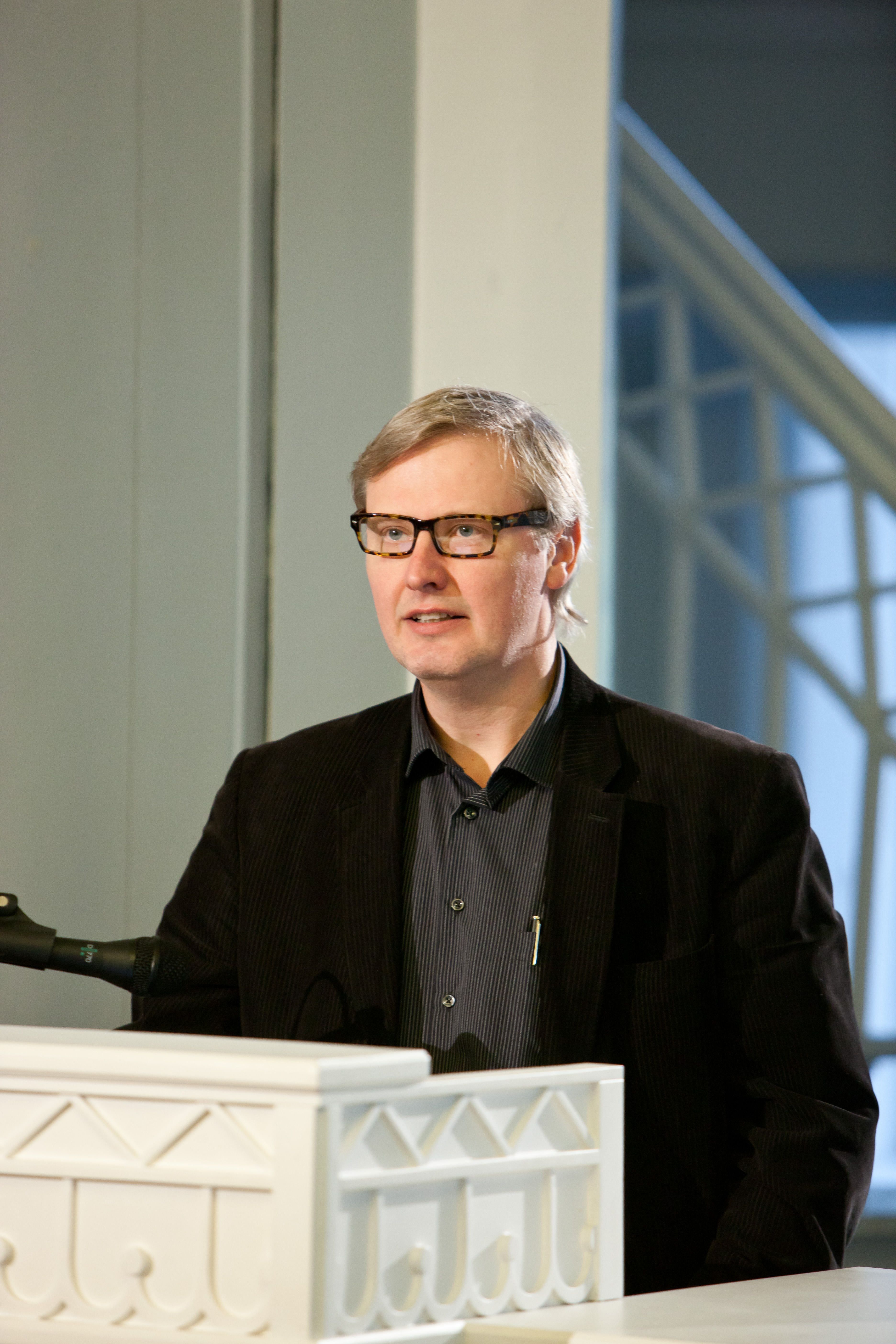 20.–22. oktoobril 2011 toimus rahvusvaheline sümpoosion "Keel ja identiteet". TÜ eesti keele didaktika professor Martin Ehala sümpoosioni 3. päeval Tartu Ülikooli ajaloo muuseumi valges saalis.